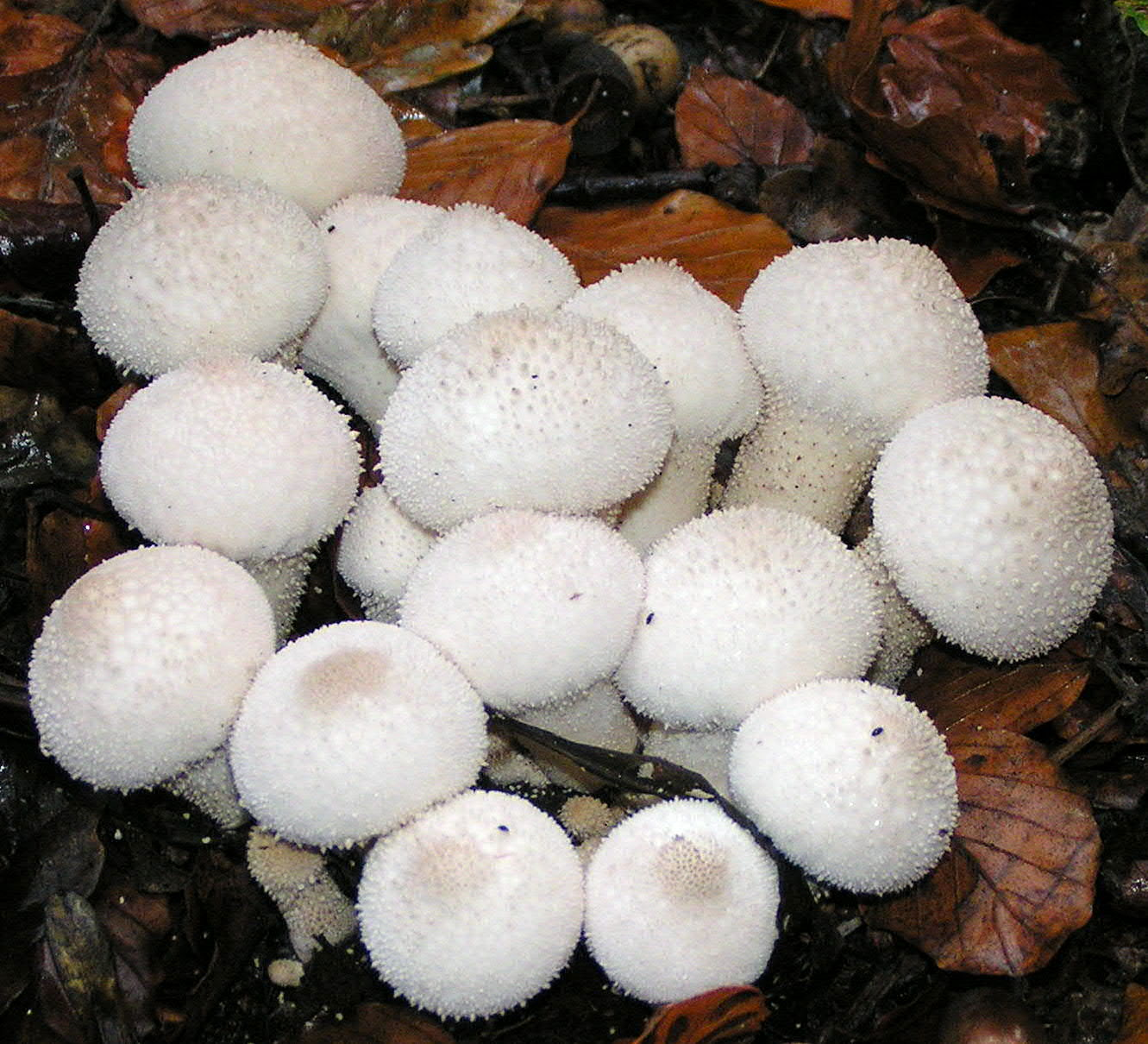 Parelstuifzwam 24 oktober 2004